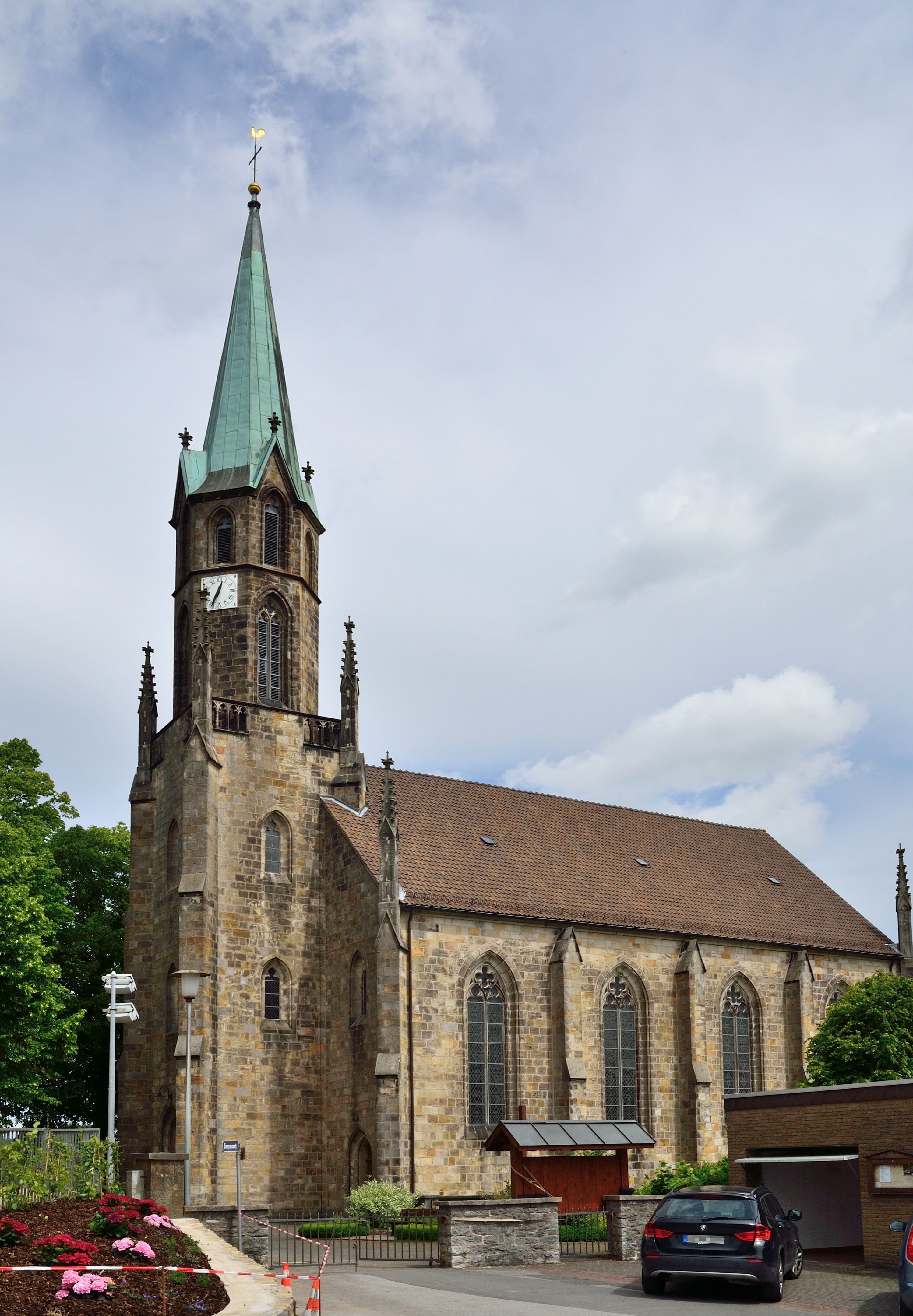 This is a photograph of an architectural monument. Katholische Pfarrkirche St. Dionysius in Steinheim-Sandebeck